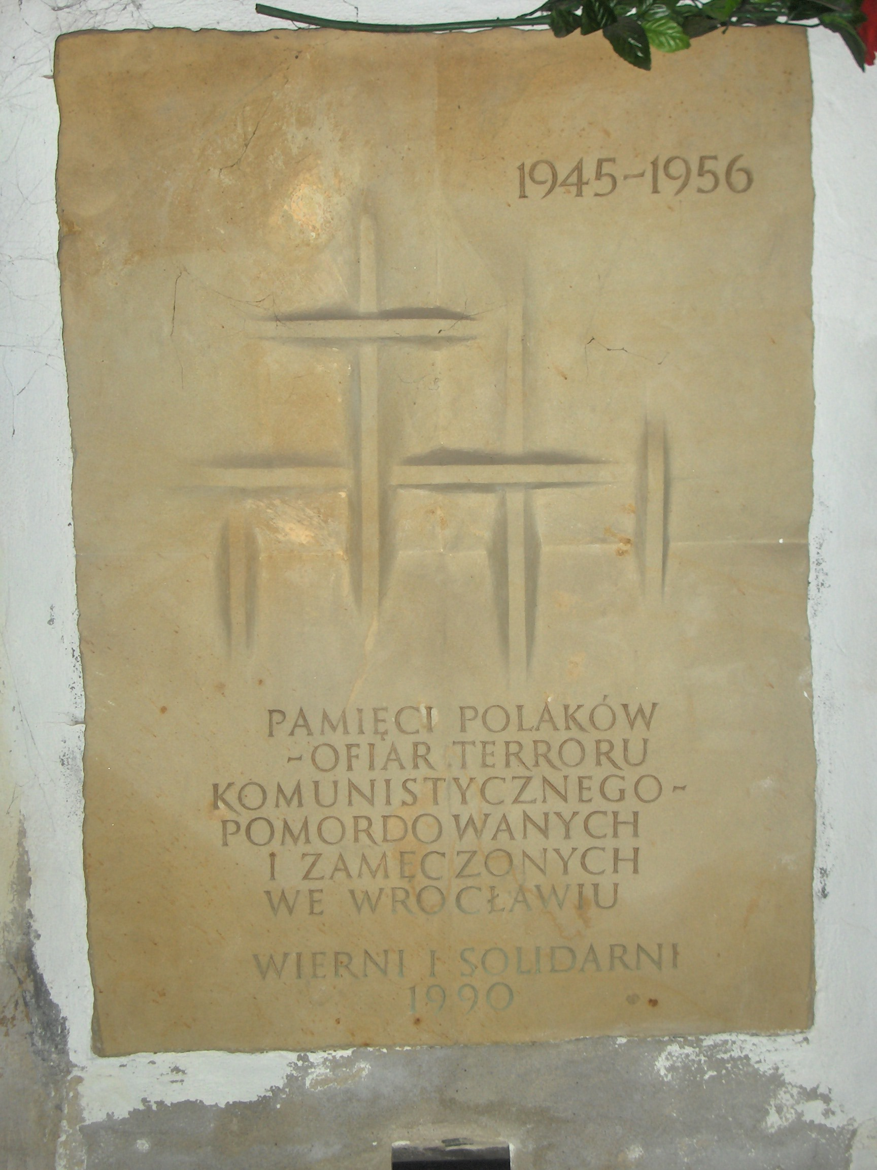 Tablica pamiątkowa w bazylice św. Elżbiety we Wrocławiu, poświęcona ofiarom terroru komunistycznego w latach 1945-1956 we Wrocławiu